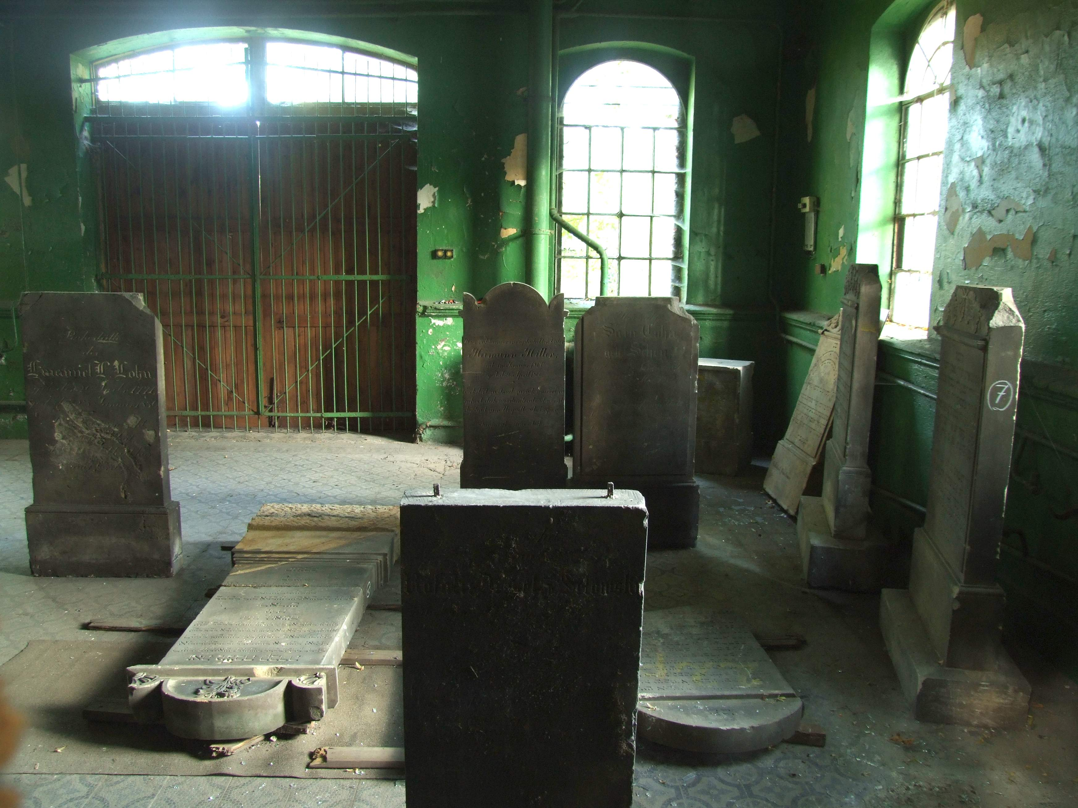 Stelae gathered in the cemetery chapel found near the former Jewish cemetery destroyed by the Germans in 1938. Zielona Góra, Poland Macewy znalezione niedaleko byłego cmentarza żydowskiego, zniszczonego w 1938, obecnie zebrane w kaplicy przycmentarnej. Zielona Góra Author: Mohylek 13:01, 17 October 2006 (UTC)